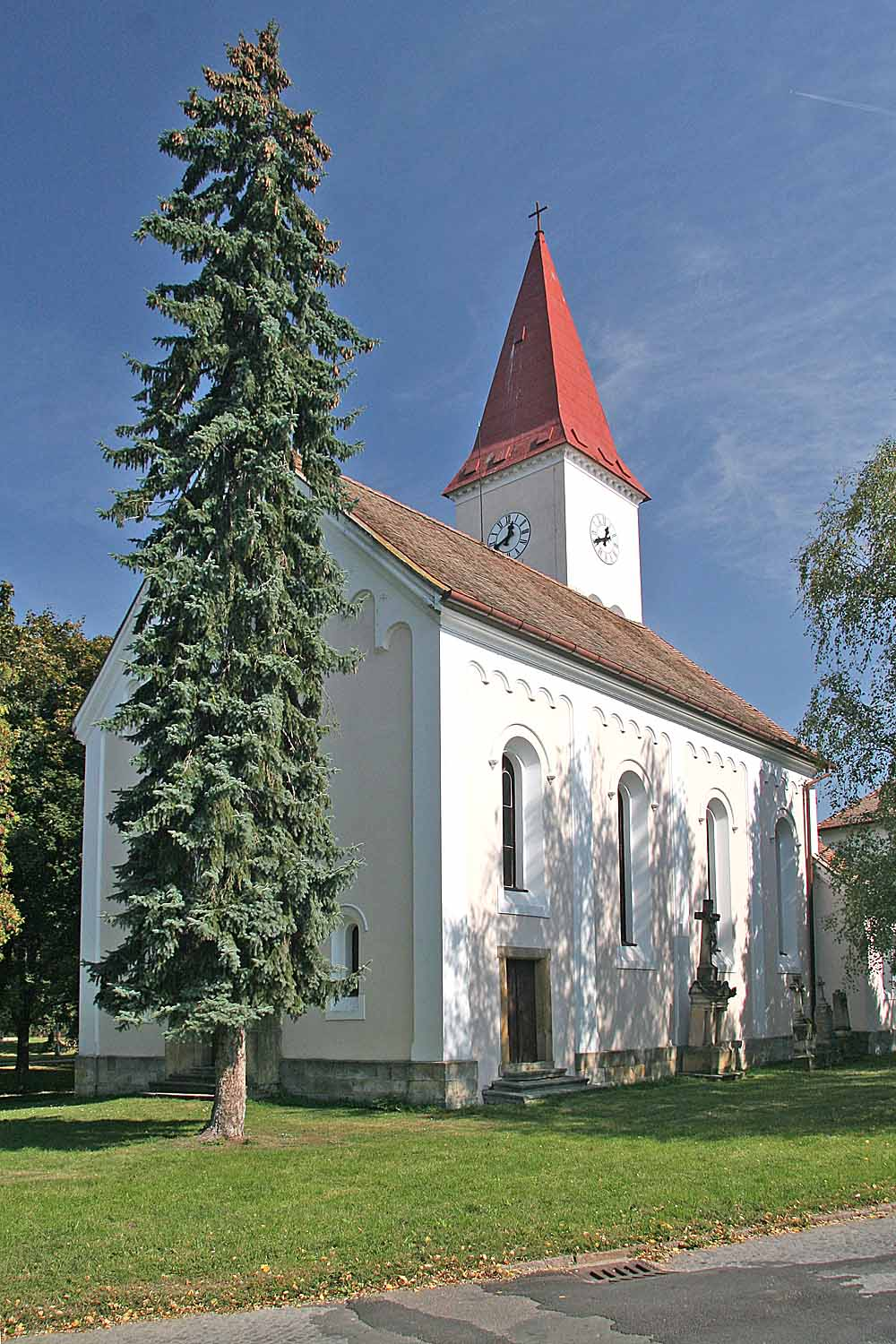 Kostel Svaté Máří Magdaleny v Nepolisech, district Hradec Králové, Czech Republic autor: Prazak date: 17. 9. 2006